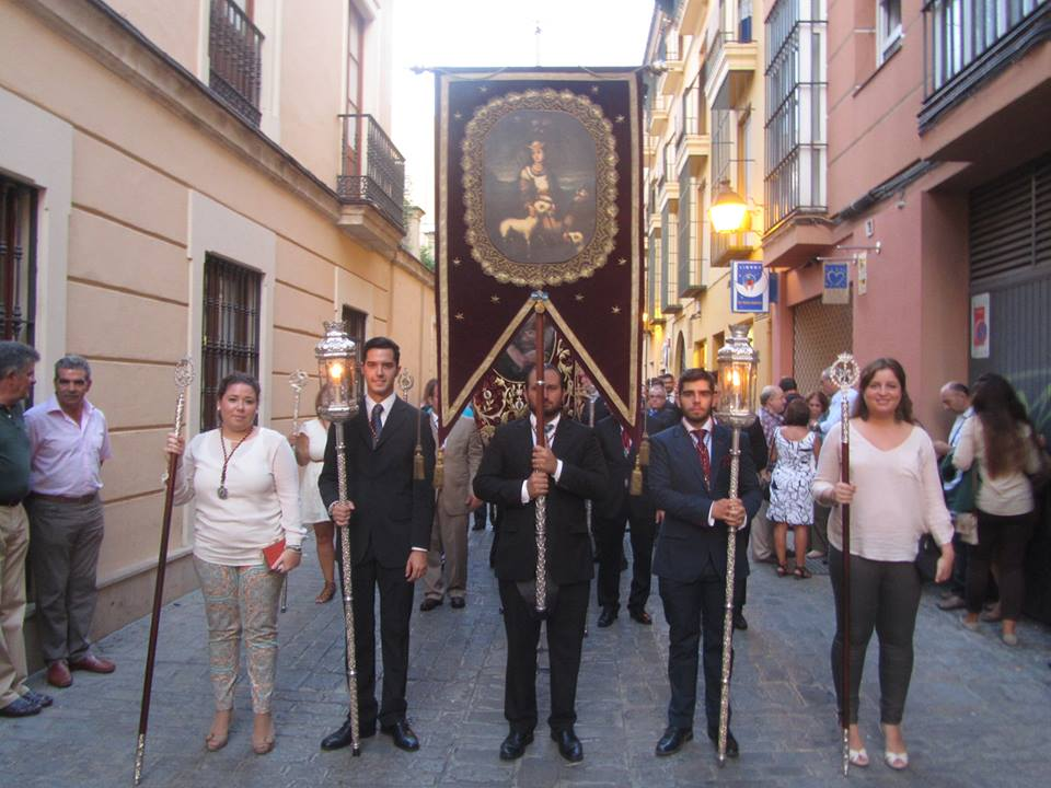 Procesión Merced